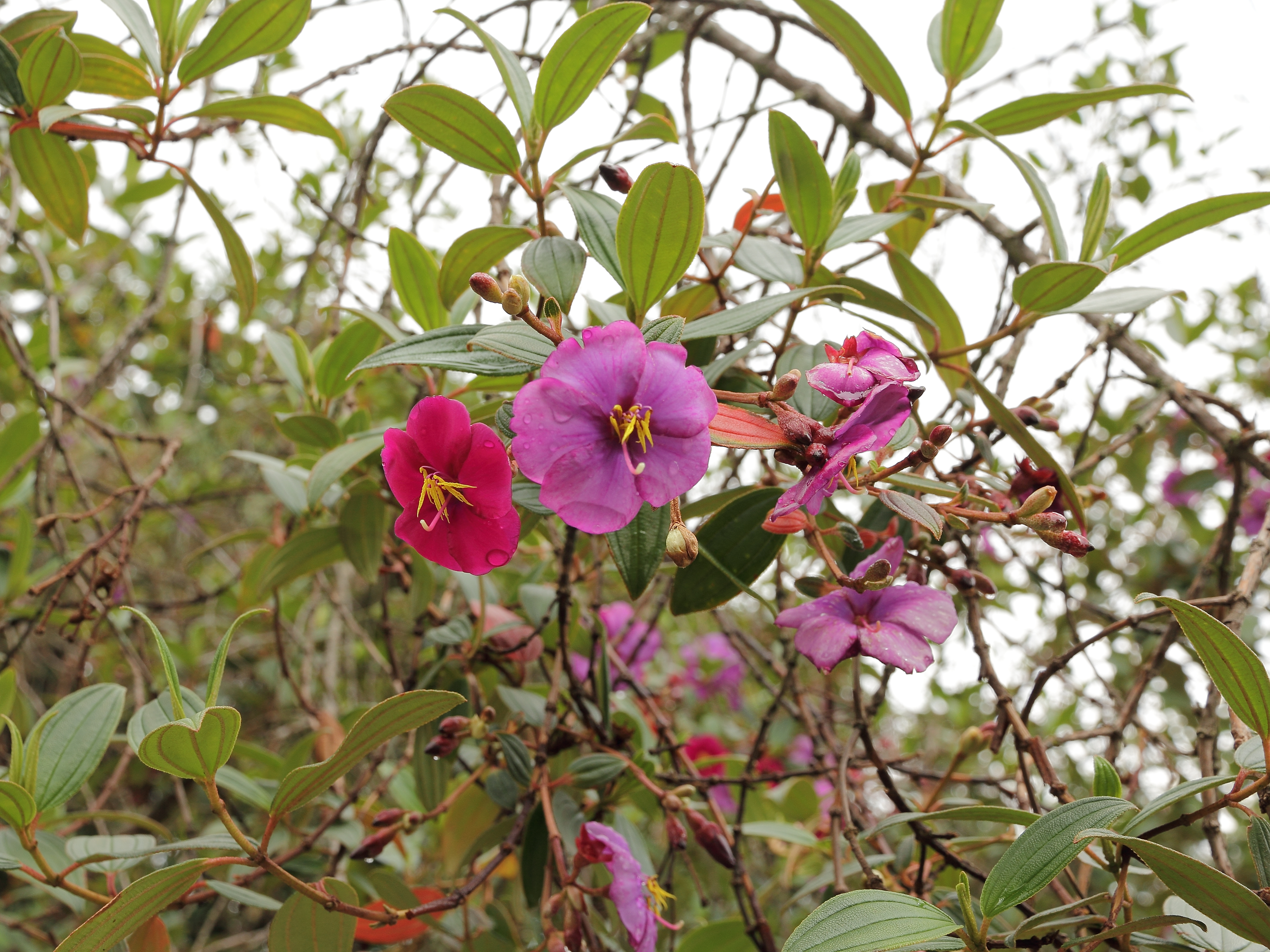 Tibouchina lepidota identifierad med hjälp av skylt i Quitos botaniska trädgård.